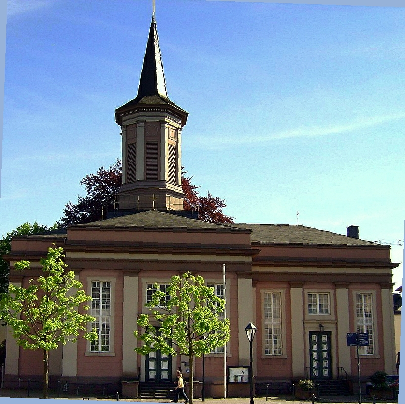 Auferstehungskirche Arnsberg